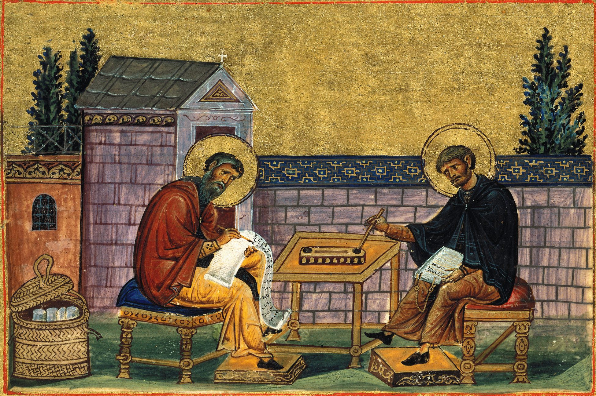 Преподобные Иоанн Дамаскин и святой Кузьма (Косьма). . Иллюстрация из 'Минология Василия II'. Начало XI в. Ватикан.